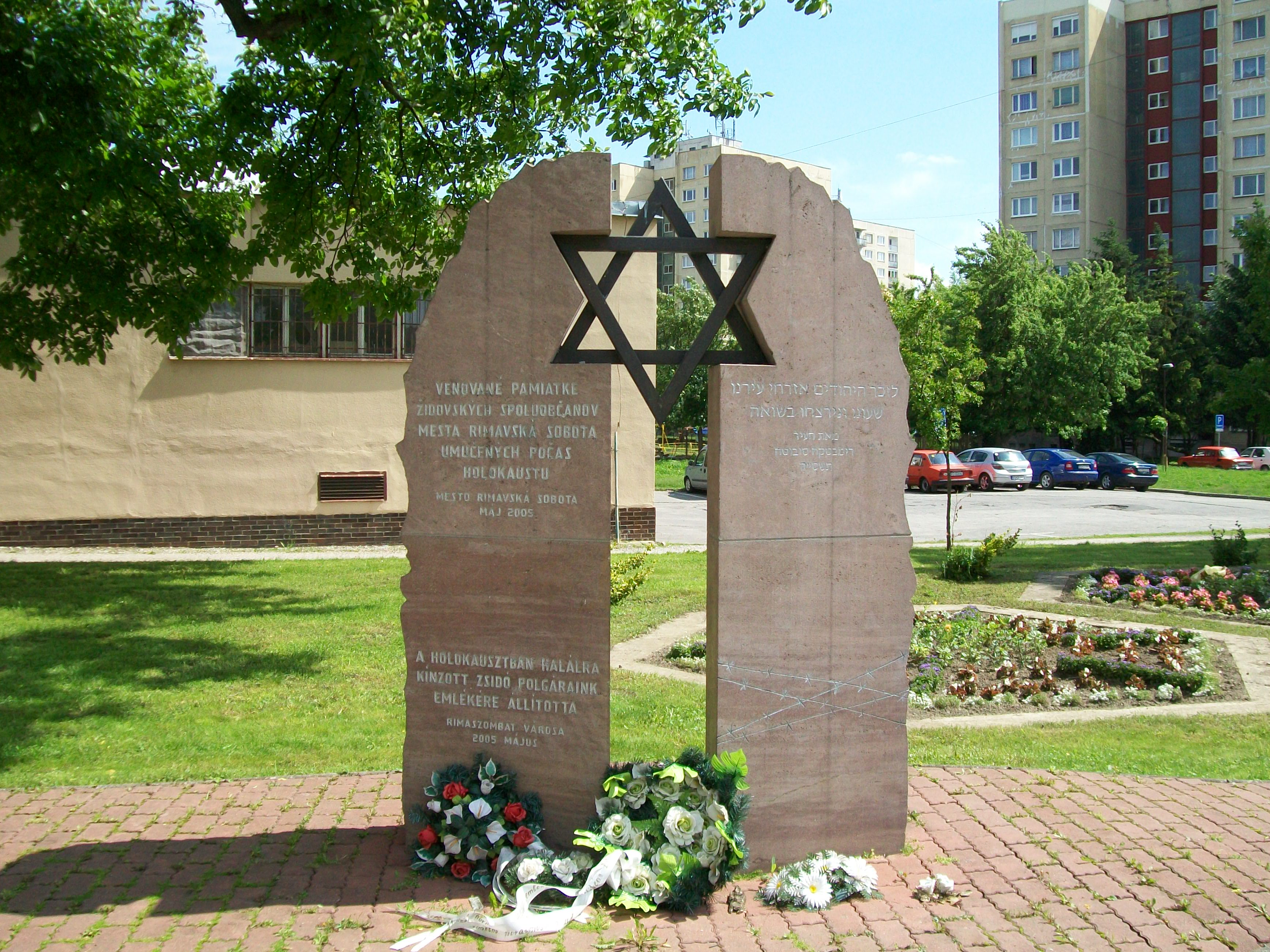 Pamätník obetiam holokaustu na Cukrovarskej ulici v Rimavskej Sobote